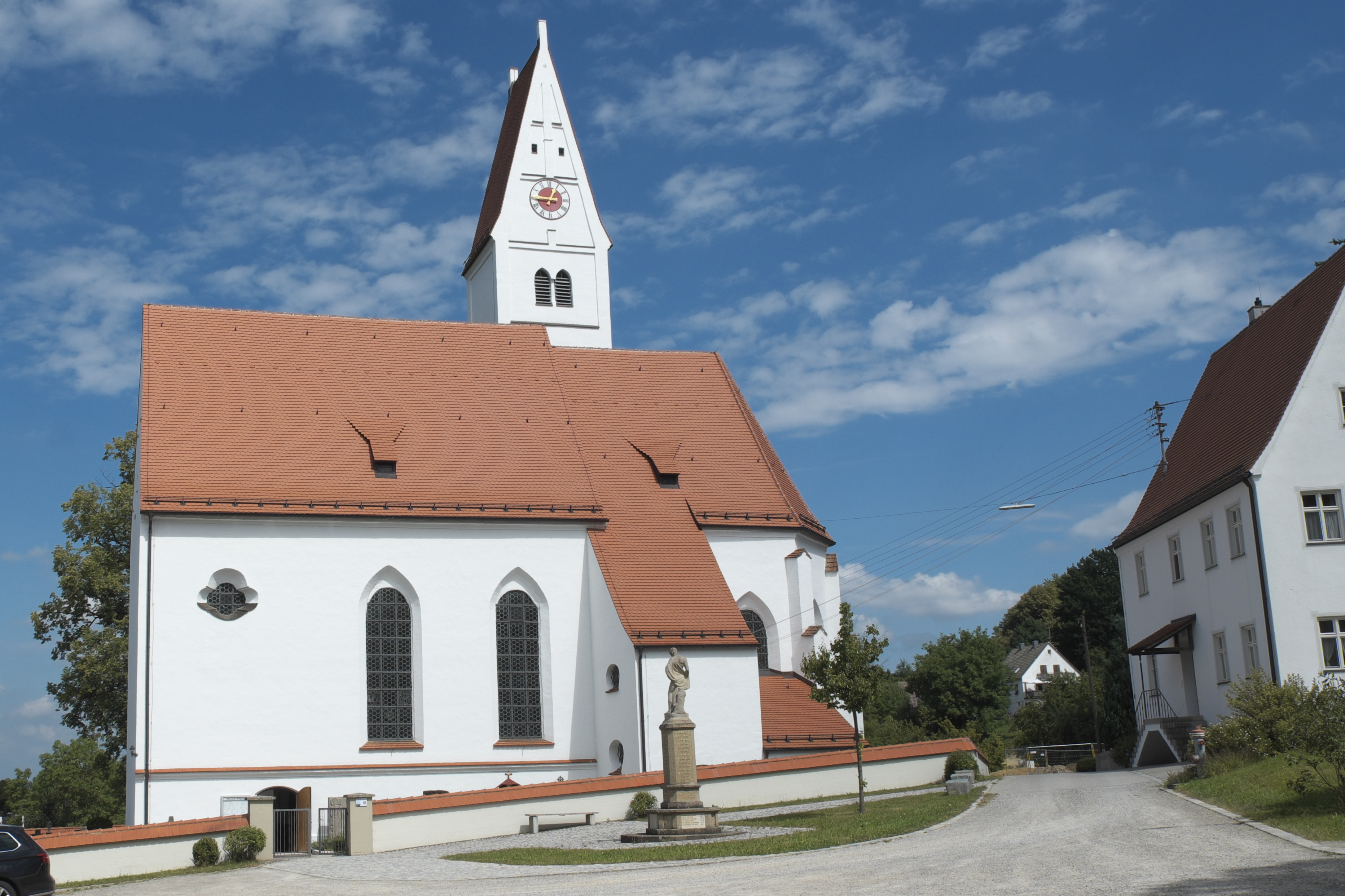 Katholische Pfarrkirche St. Wolfgang in Mickhausen im schwäbischen Landkreis Augsburg (Bayern/Deutschland)